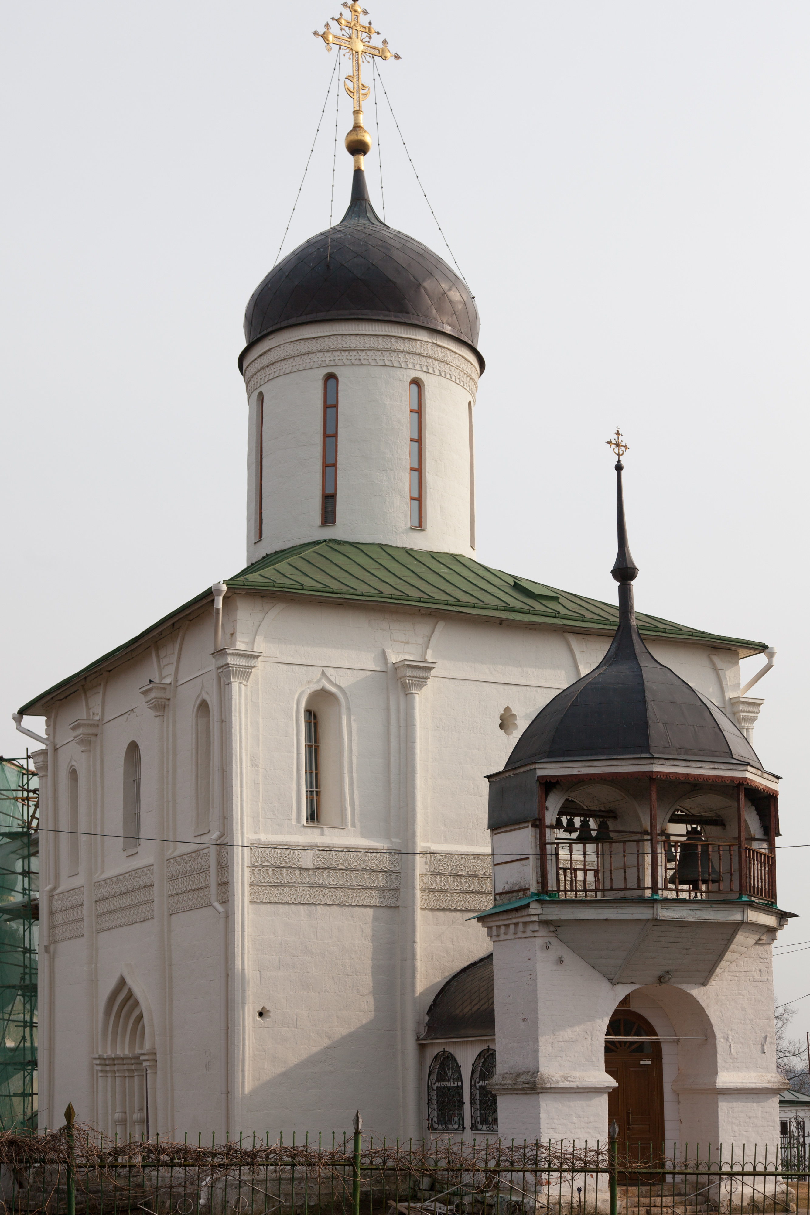 Ансамбль собора Успения Пресвятой Богородицы «на Городке» (Москва и Московская область, Звенигород, Городок)